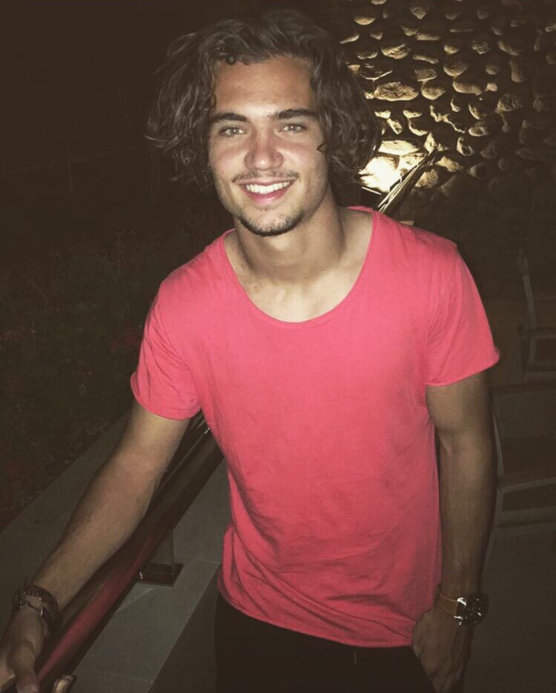 Mink Peeters